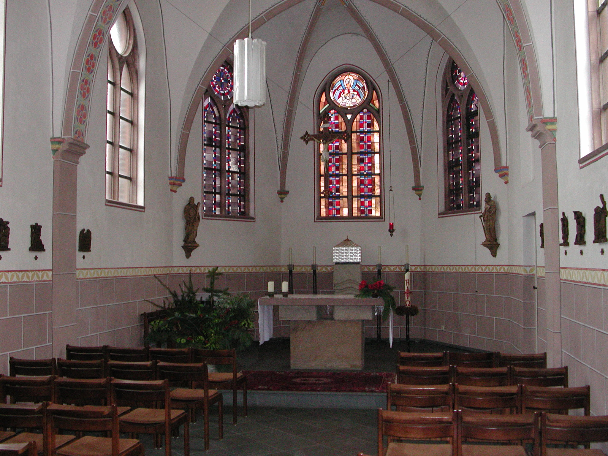 Distelrath bei Dürener, Kapelle innen